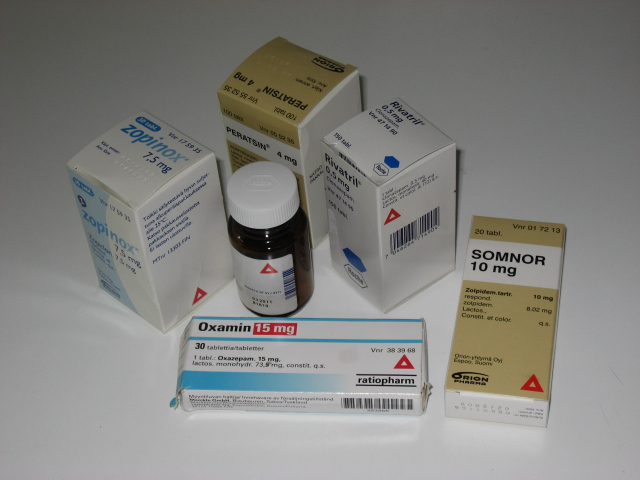 Psyykenlääkkeitä